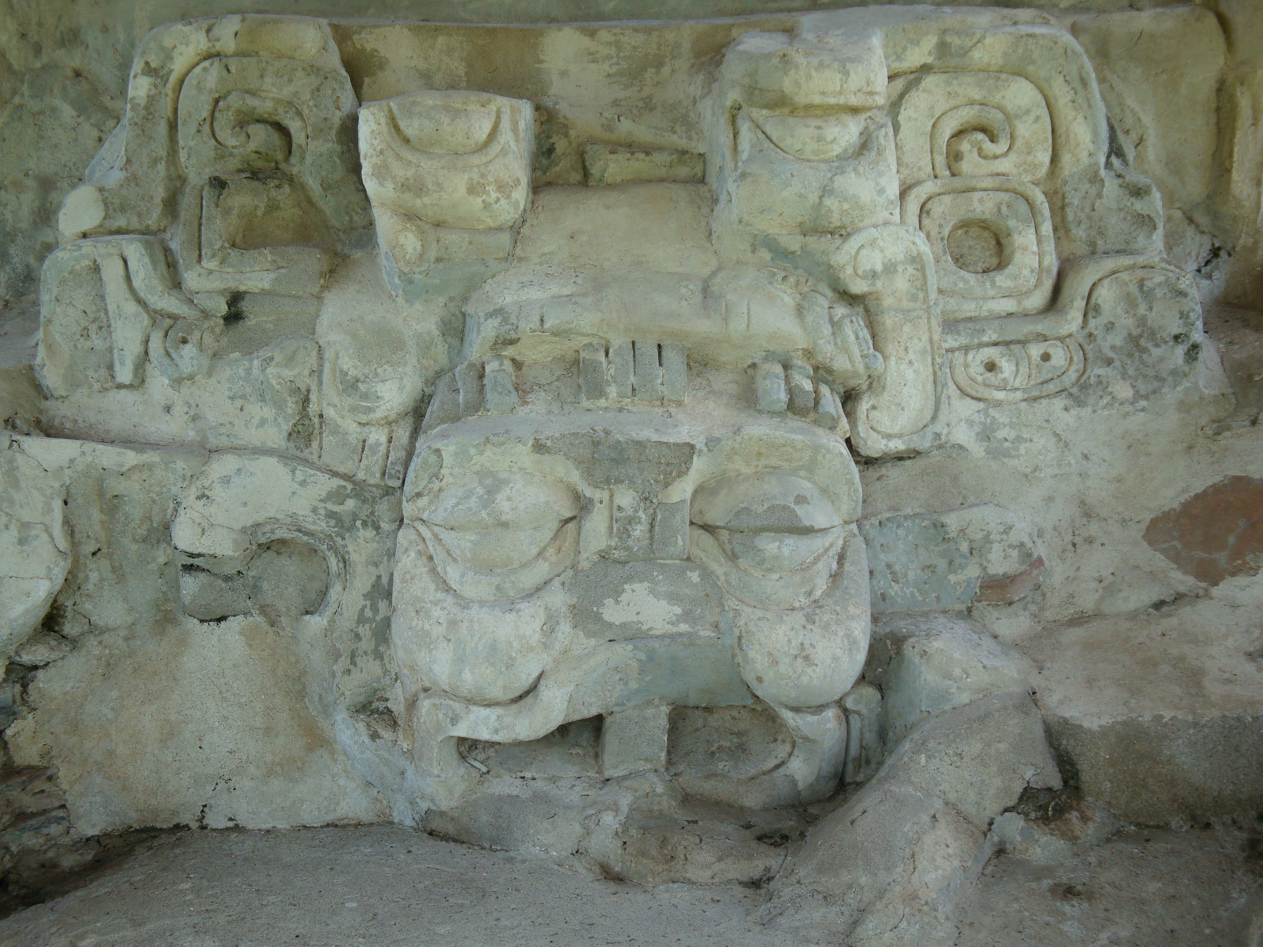 Mascarón que representa a "Itzamnaaj", dios del cielo, localizado en el Templo VI, en la zona arqueológica de Comalcalco, Tabasco, México.